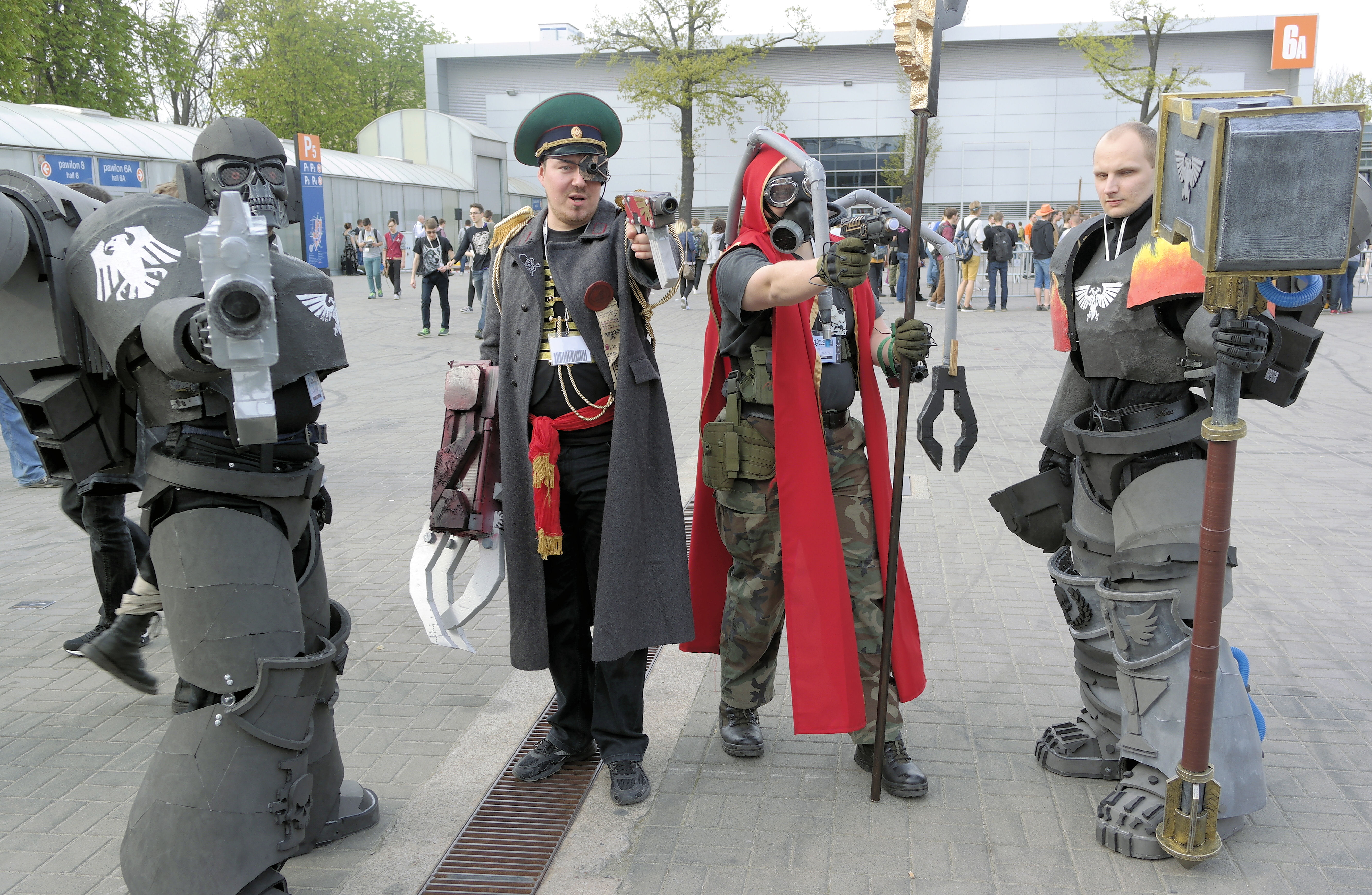 Cosplay Warhammer 40k, Festiwal Fantastyki Pyrkon w Poznaniu